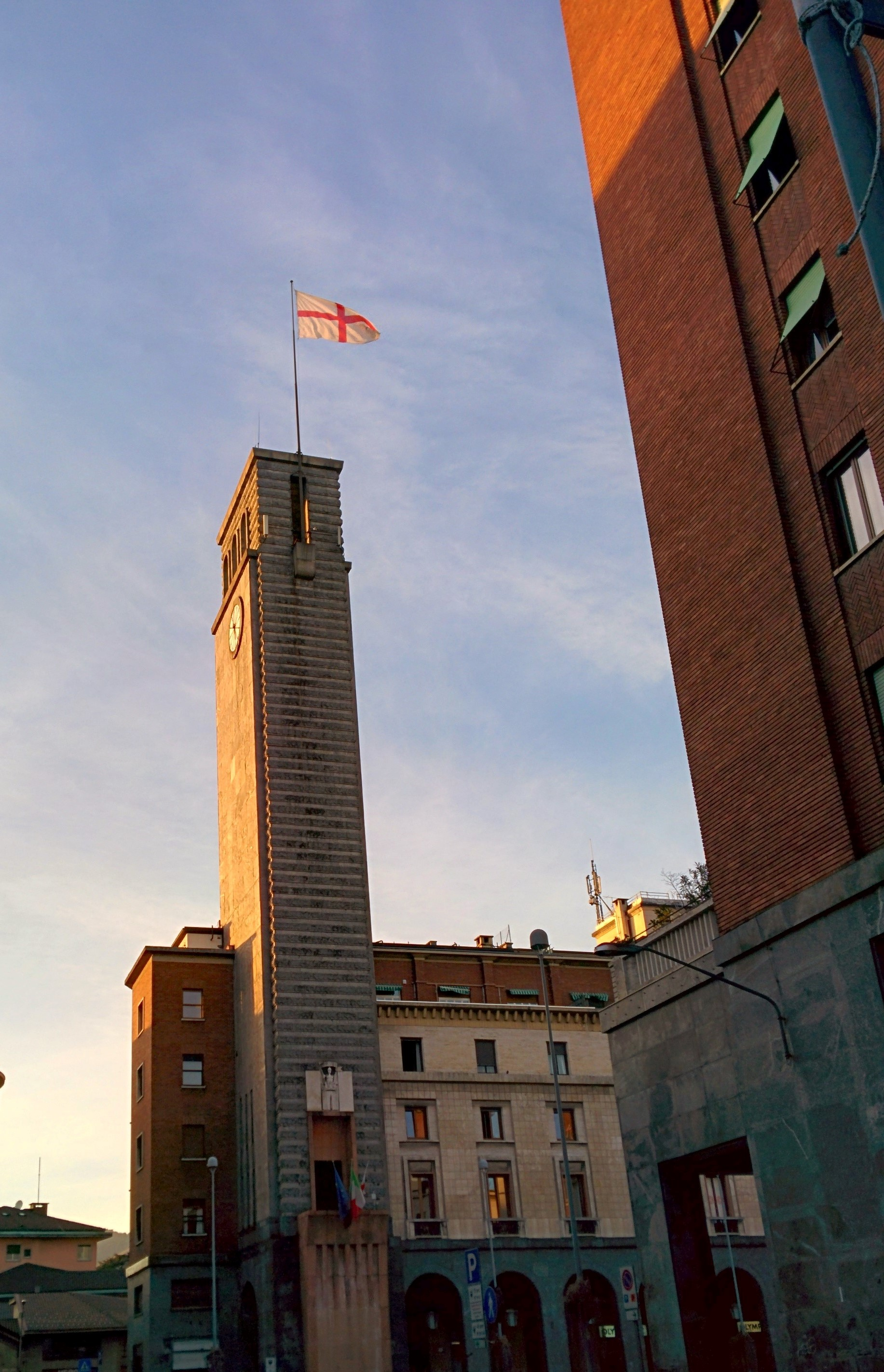 Torre Civica di Varese